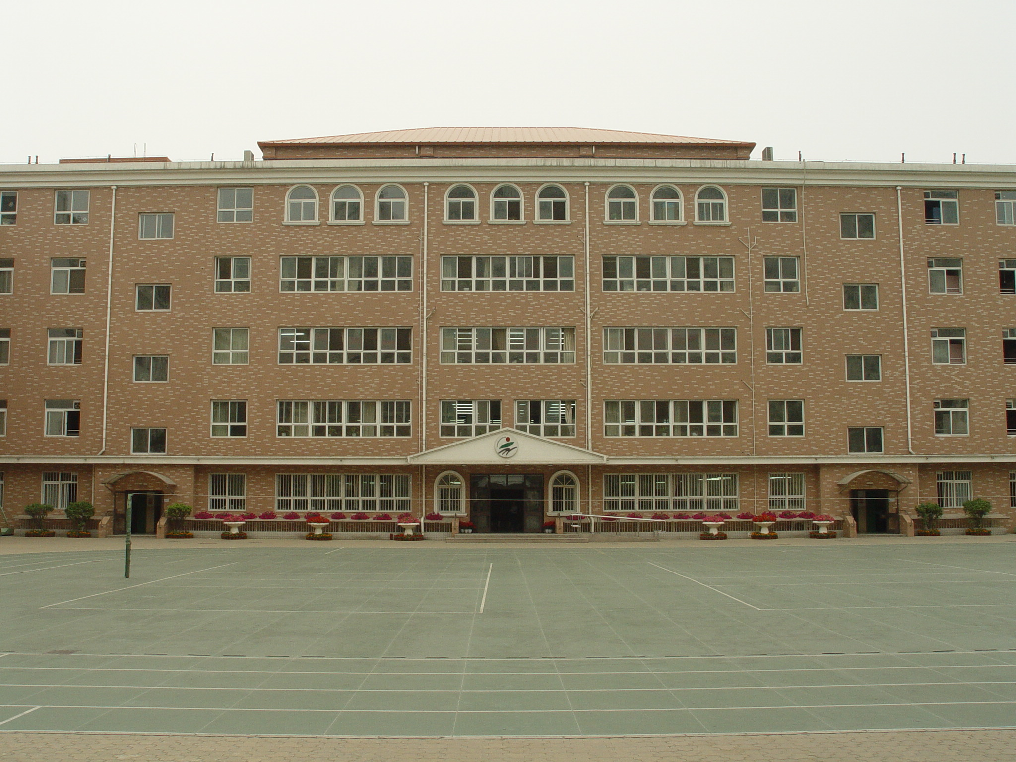 北京育民小学南楼全貌，从操场内部拍照